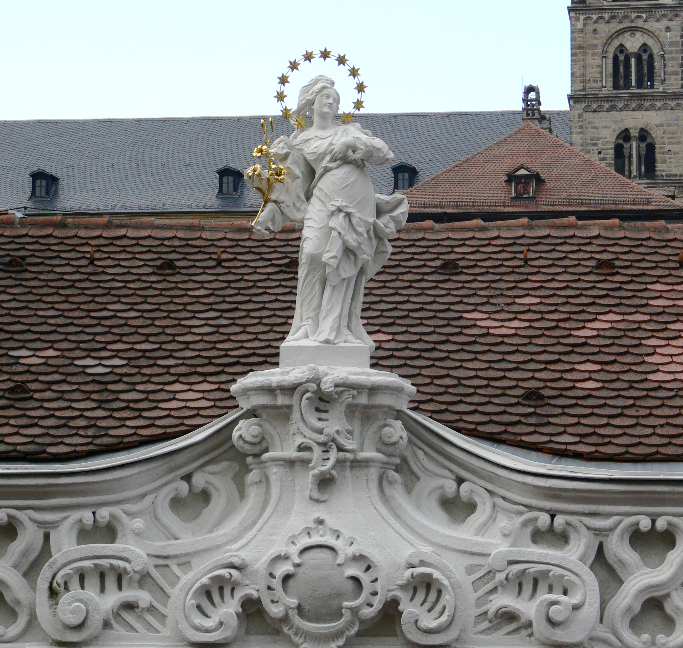 Bamberg, Neuer Ebracher Hof, Unterer Kaulberg 4, Immaculata-Statue